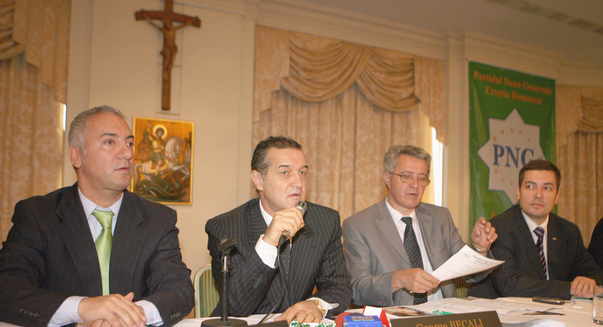 Catalin Dancu (secretar general), George Becali (preşedinte), Marian Oprea şi Vlad Hogea (vicepreşedinţi) în prezidiul Consiliului Naţional al PNG-CD, 14 septembrie 2007